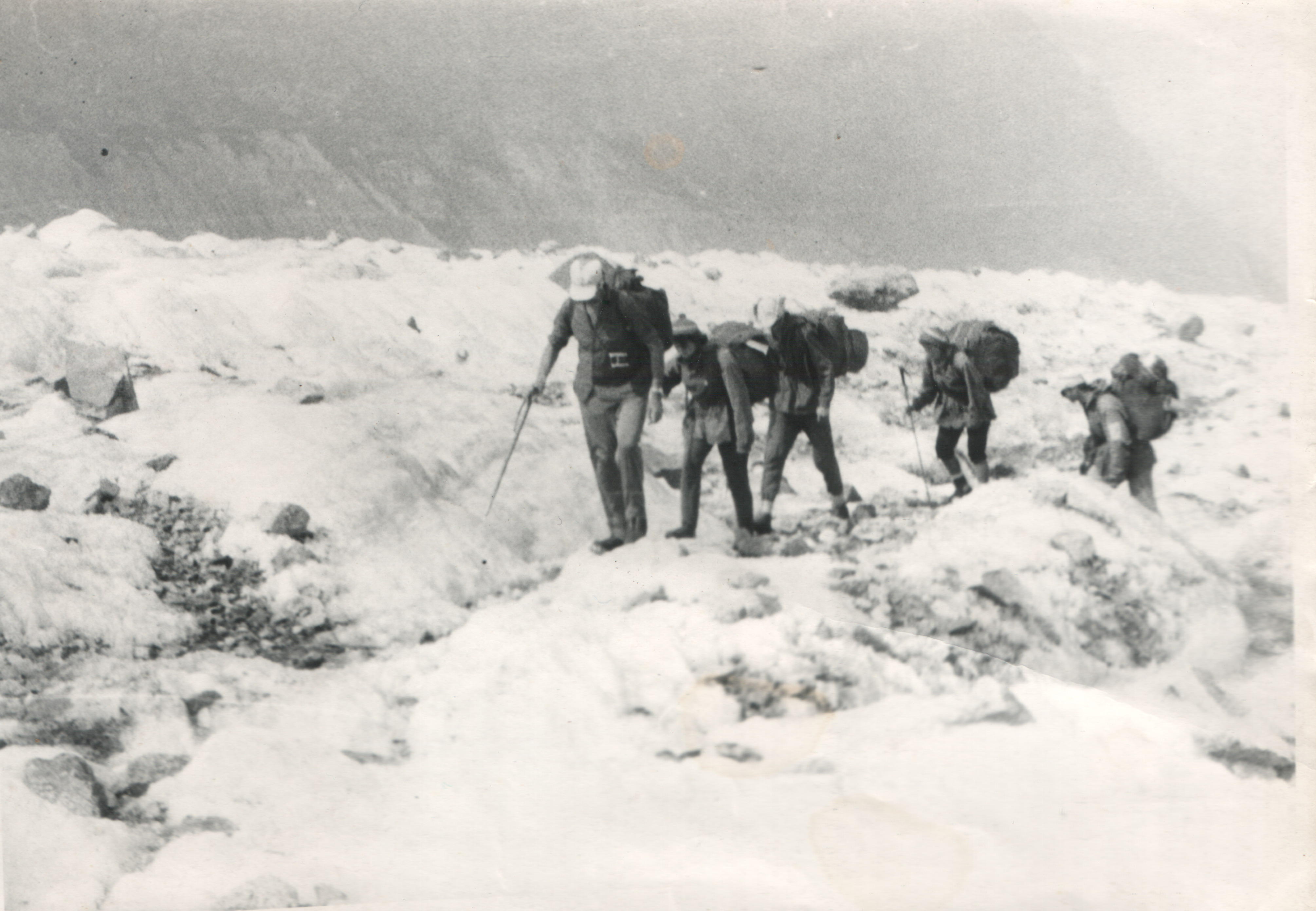 Безенгі: Фото